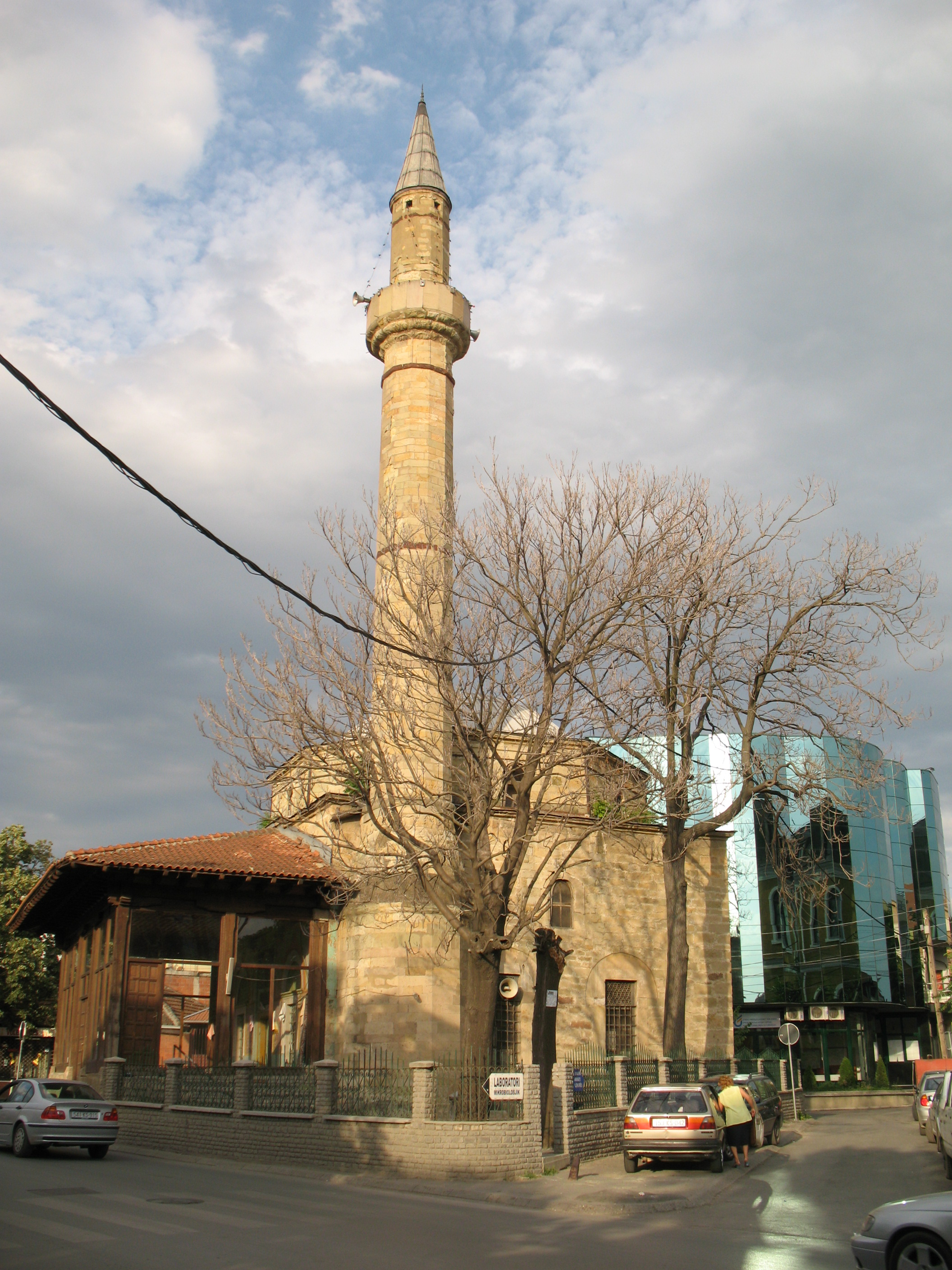 Jashar Pasha mosque